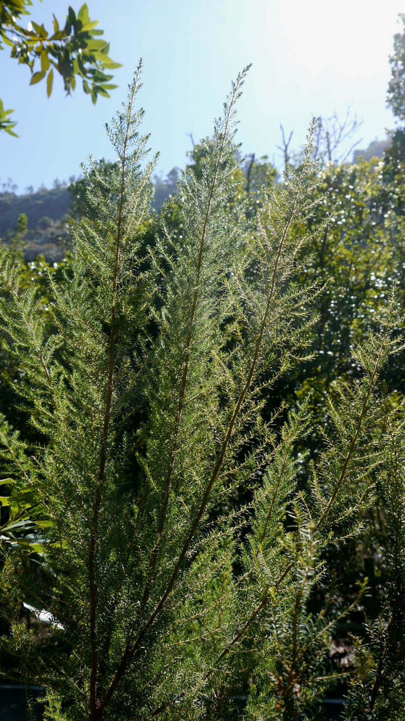 Brezo (Erica arborea) en los Tilos de Moya, Gran Canaria (España).